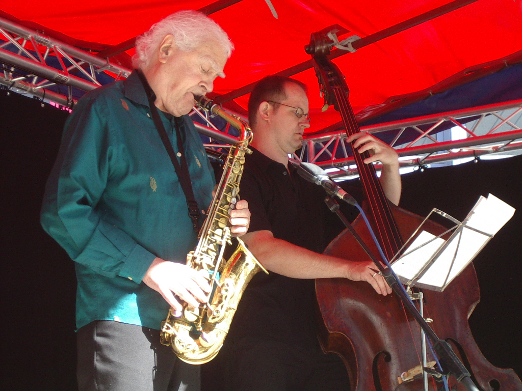 Charlie Mariano und Dieter Ilg, Monschau (Germany) 2005